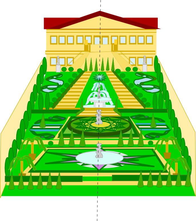 vektorová grafika, Inscape, zahrada